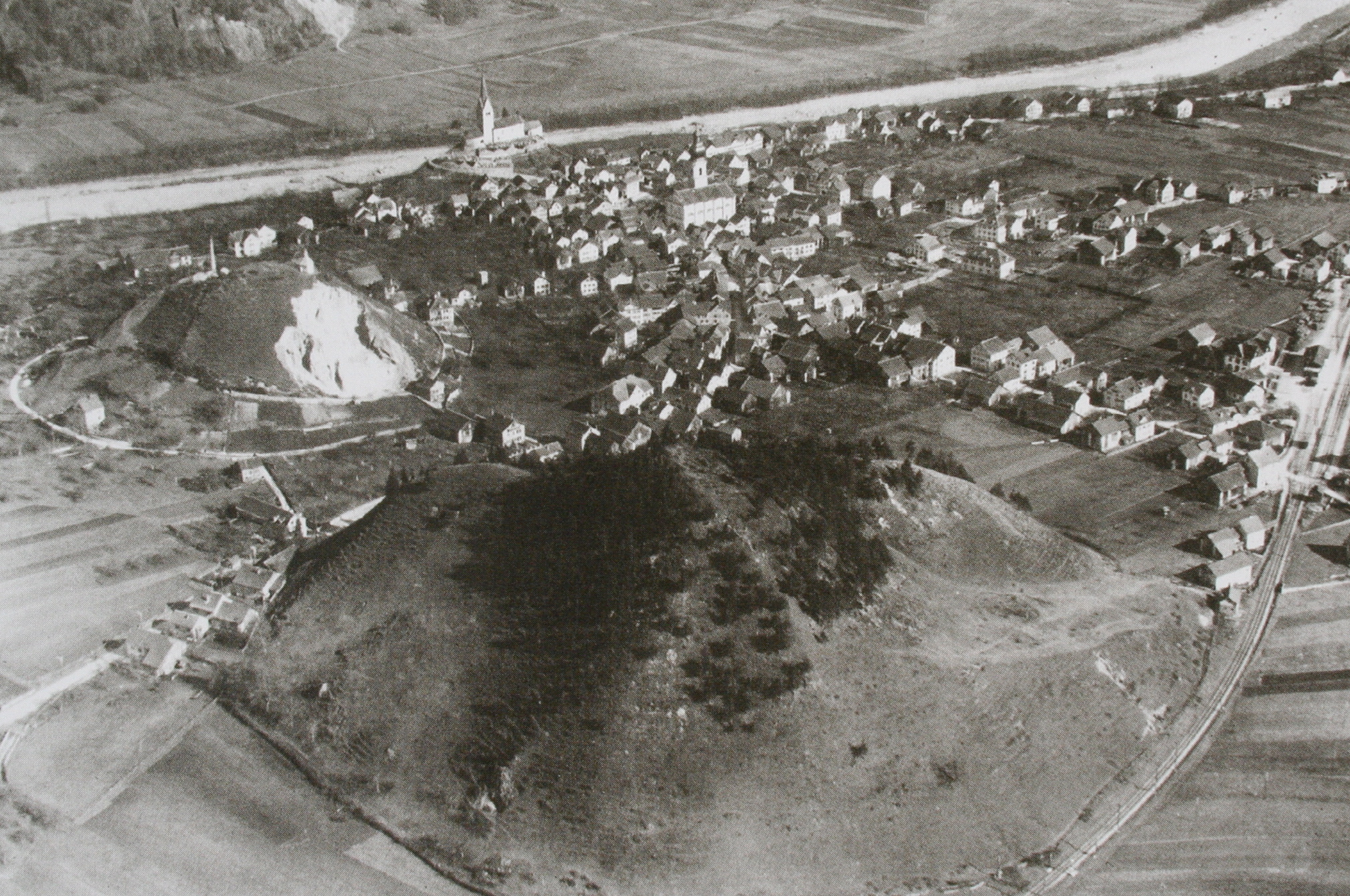 Domat-Ems 1925, Blick von Süden, Aufnahme von Walter Mittelholzer (1894 - 1937)